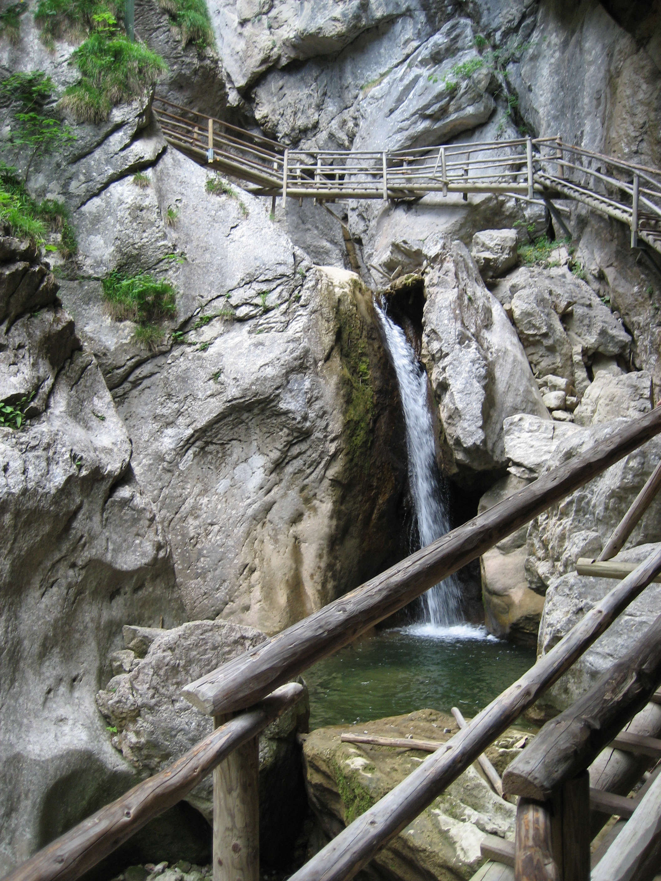 Bärenschützklamm bei Mixnitz, Steiermark, Österreich (Bärenschützklamm in Styria, Austria)